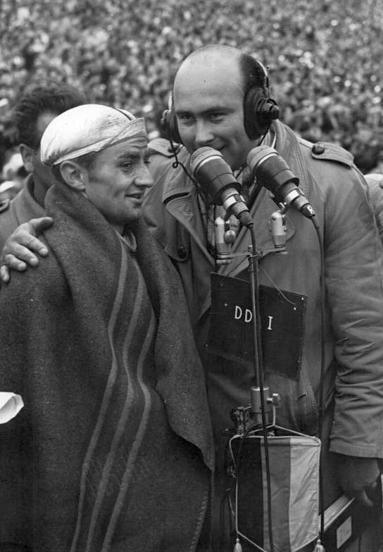 Zentralbild/Wendorf 5.5.1959 XII. Internationale Friedensfahrt - 3. Etappe von Magdeburg nach Leipzig. Am 4.5.1959 wurde die 3. Etappe von Magdeburg nach Leipzig gefahren. Eckstein, der hinter Bebenin (SU) Zweiter wurde, hat sich bei dieser Etappe das Gelbe Trikot erkämpft. UBz: Eckstein (DDR), der Zweite der 3. Etappe mit [ Heinz] Florian Oertel am Mikrofon des Deutschlandsenders. [Bernhard] Eckstein hat sich in dieser Etappe das Gelbe Trikot geholt.